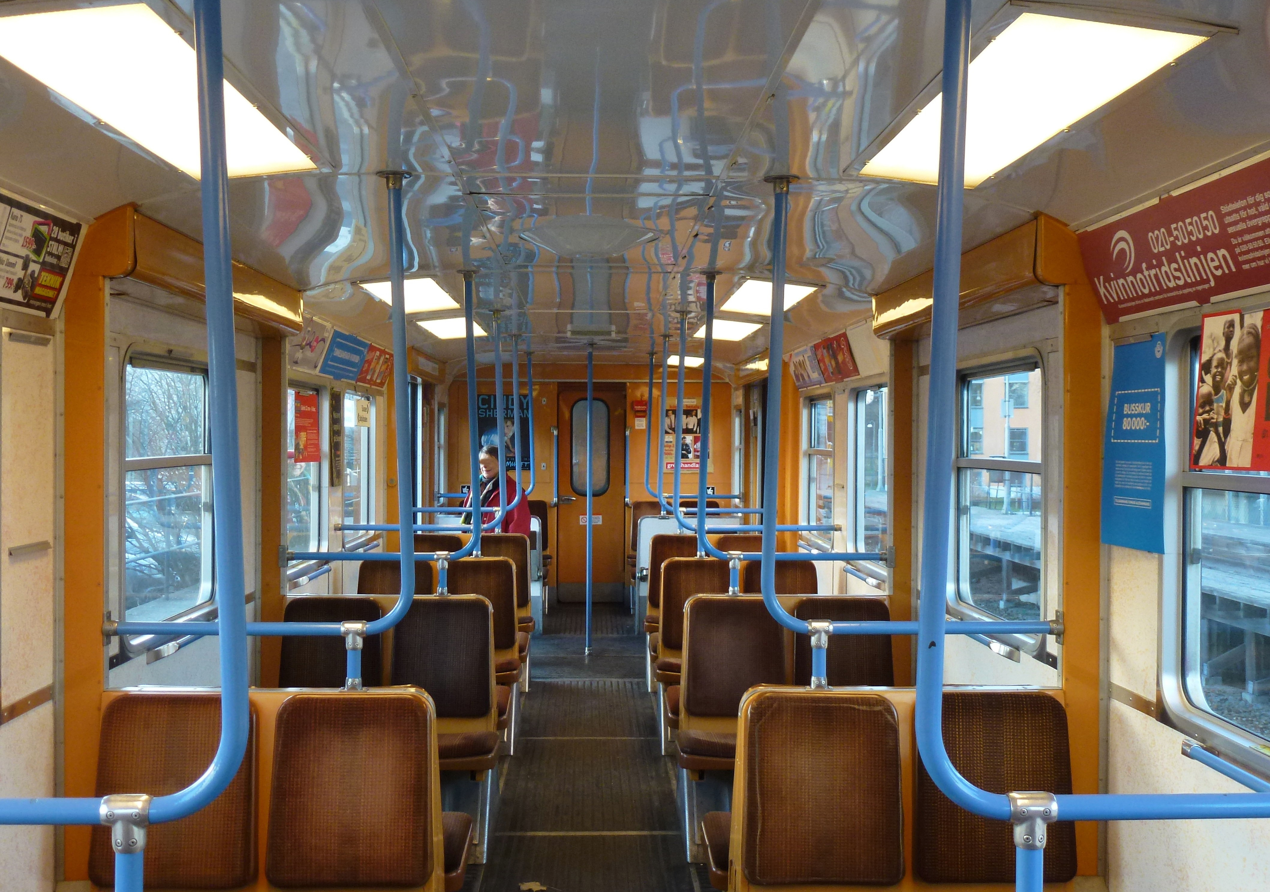 Saltsjöbanan, interiör